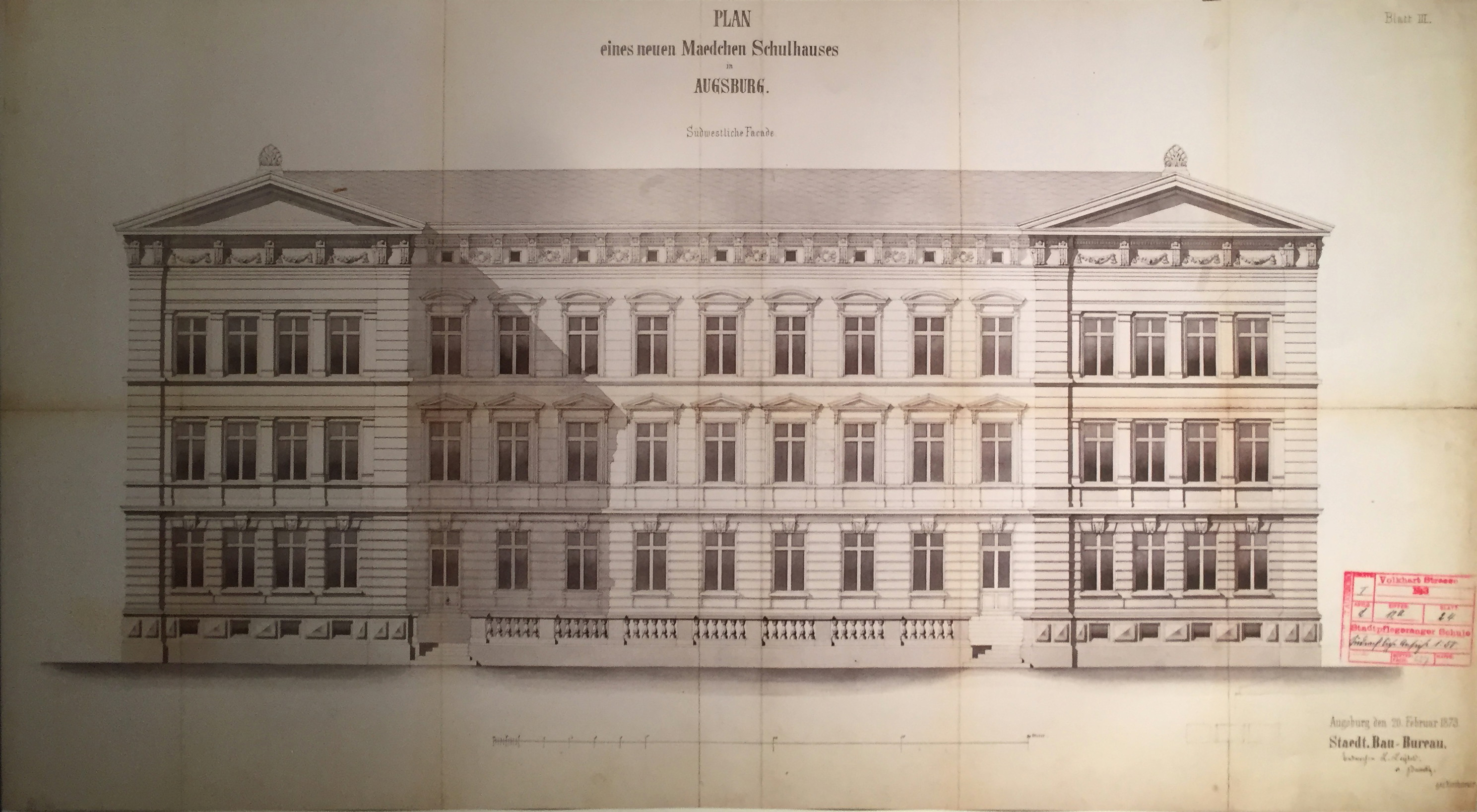 St.-Anna-Grundschule (Augsburg), Entwurfszeichnung des Architekten